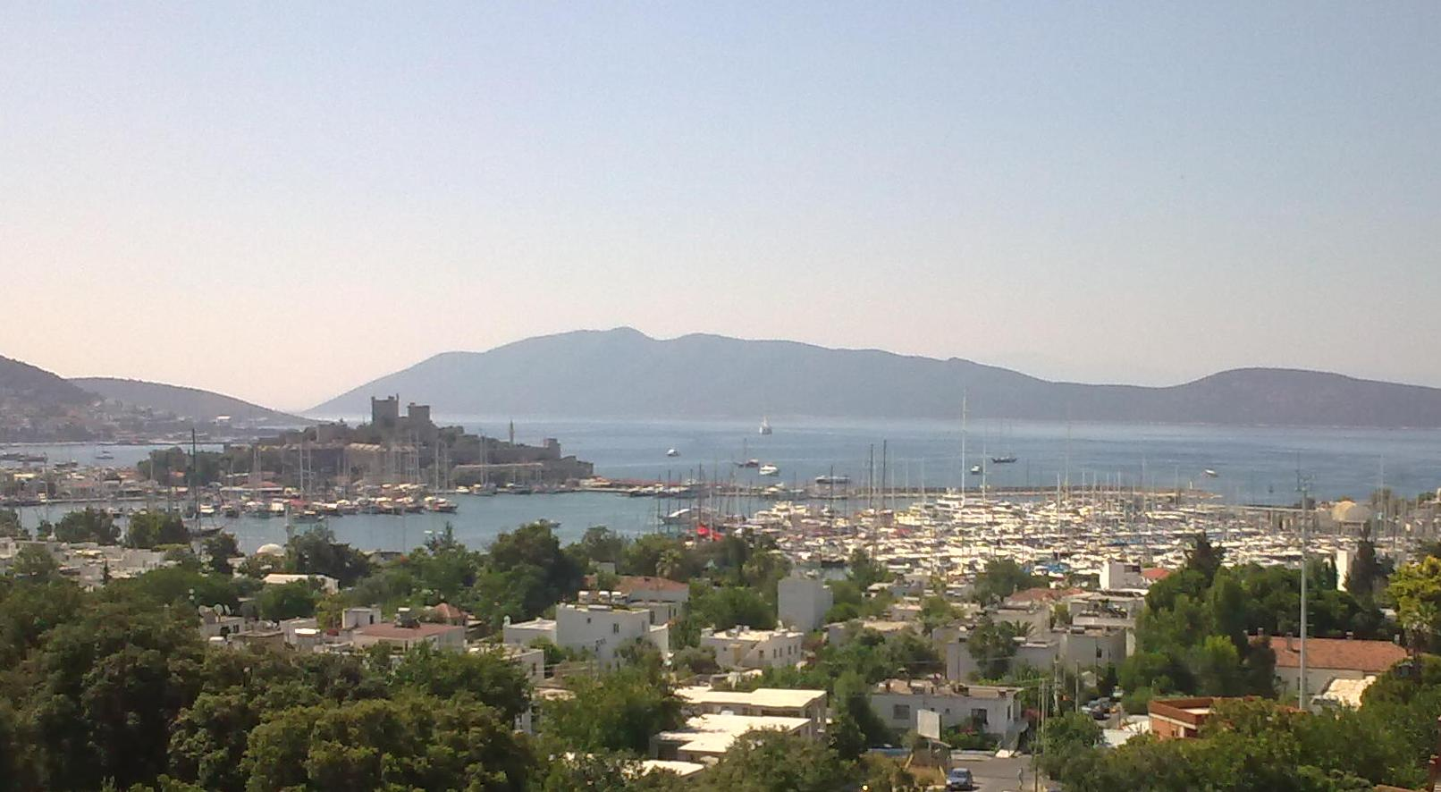 Bodrum